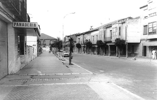 Calle con soportales con vigas de madera. Panadería en primer término. - Medina del Campo (Valladolid) - Calle con soportales con vigas de madera. Panadería en primer término. - Fotografía. Papel 115 x 76 B/N